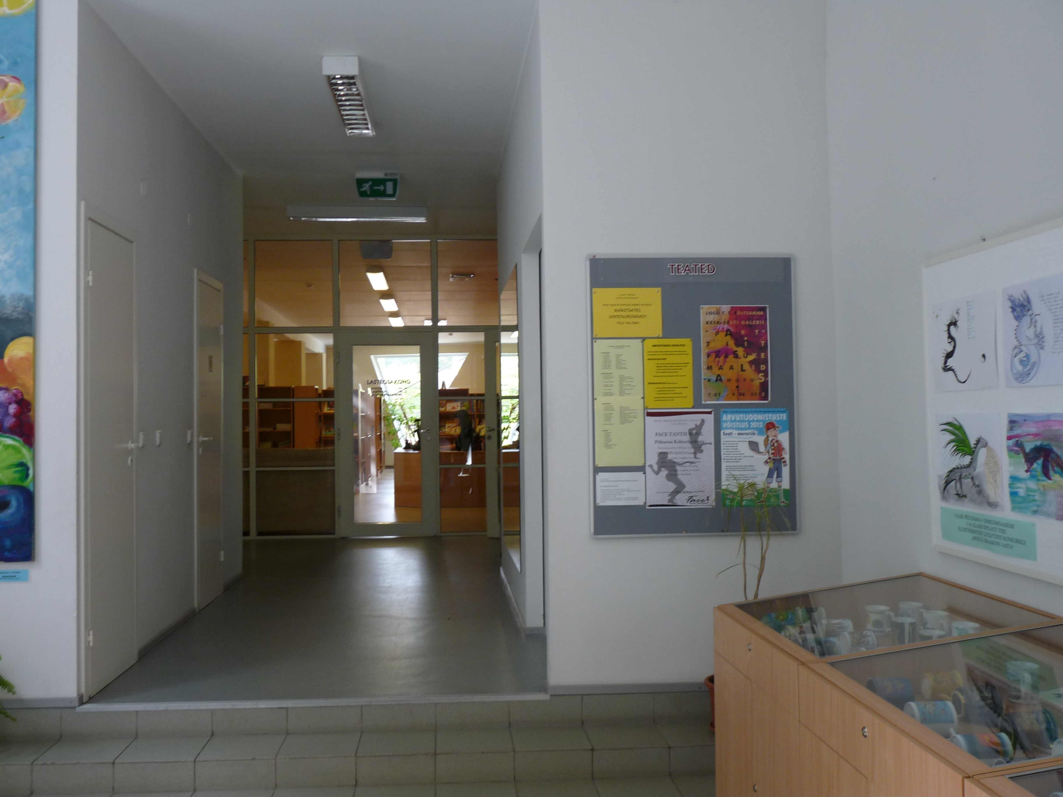 Jõgeva maakonna keskraamatukogu sisevaade, Põltsamaa, Veski 3, 11. september 2012